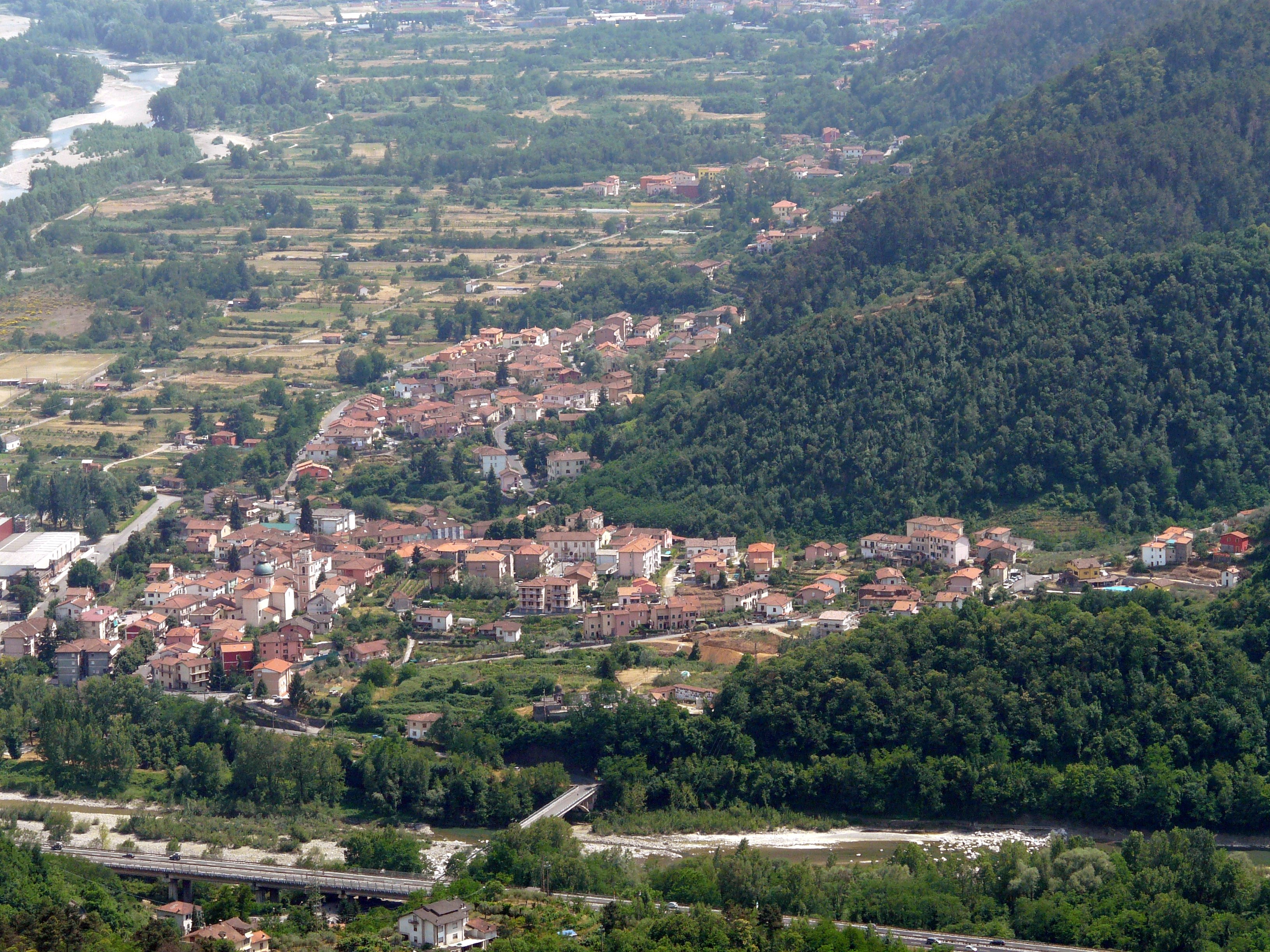 Panorama di Piana Battolla (Follo) dalla frazione di Madrignano, Calice al Cornoviglio, Liguria, Italia